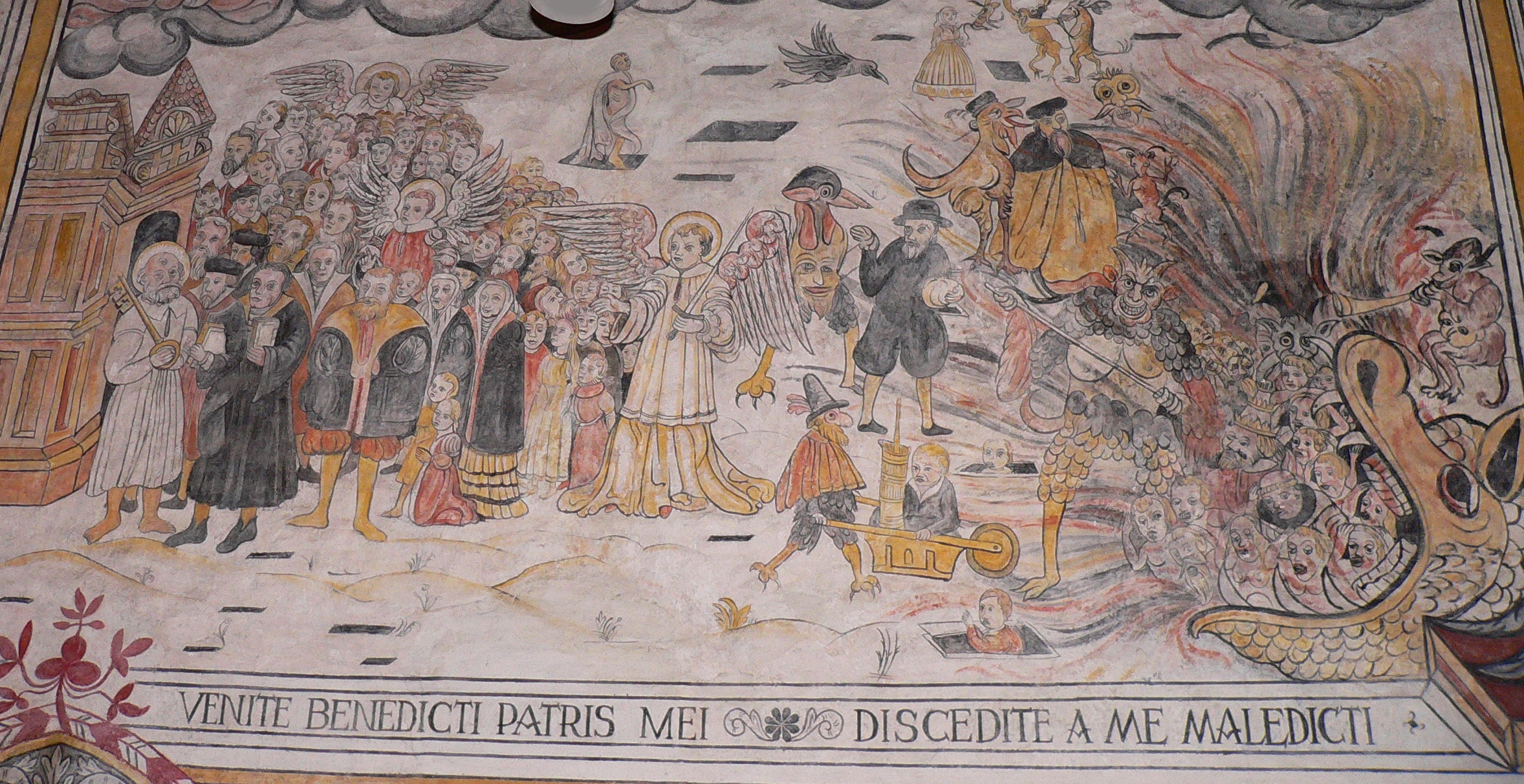 Evangelische Kirche St. Laurentius in Dassel, Niedersachsen, Deutschland - Ausschnitt der protestantischen Renaissancemalerei (Secco): "The Last Judgment" von 1577